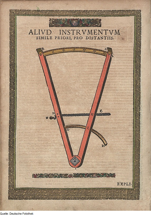 Original image description from the Deutsche Fotothek Astronomie & Vermessung & Messinstrument